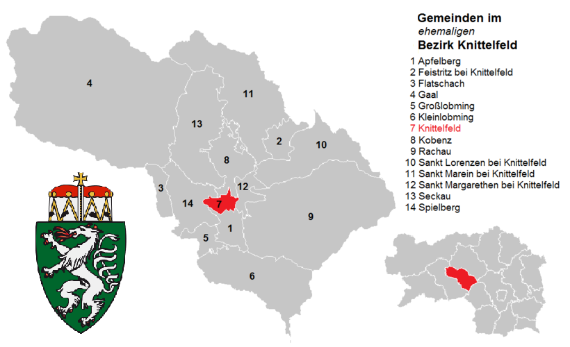 Bezirk Knittelfeld